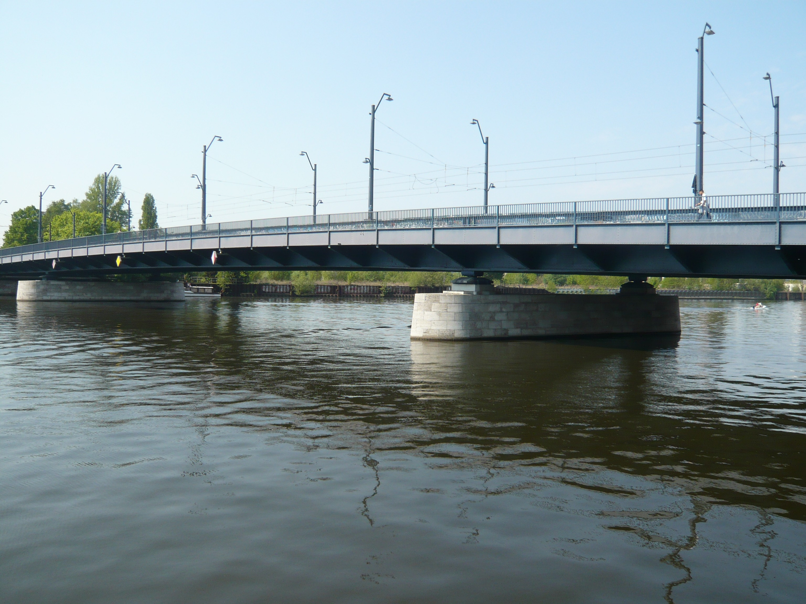 Treskowbrücke in Berlin-Oberschöneweide; Schmierereien digital geputzt